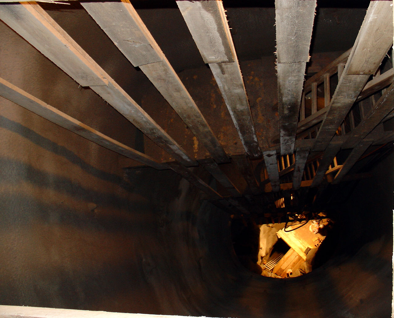 Sanierung des Obervereinigtfelder Schachtes. Gemeindeparkplatz Zinnwald (Erzgebirge), Sachsen, Deutschland.